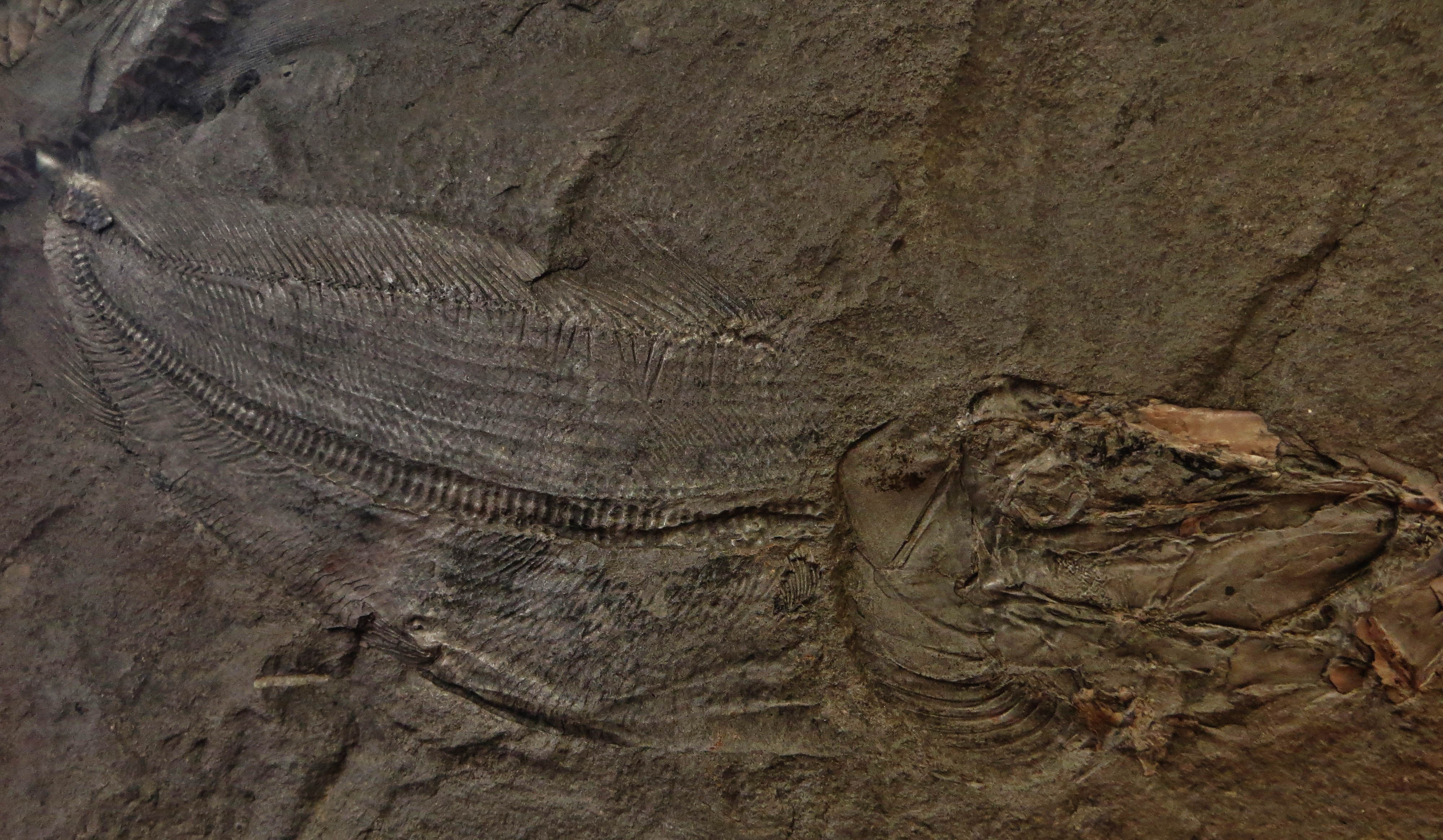 Fossil of Istieus - Took the picture at Natural History Museum, Bonn University